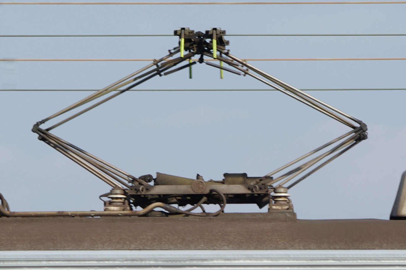 東急8500系電車 デハ8532のja:集電装置（PT-4309S-A-M形）